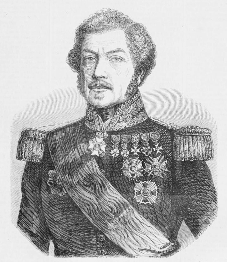 Le général Schramm, ministre de la Guerre (1850-1851).